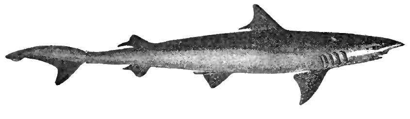 Hemigaleus balfouri = Chaenogaleus macrostoma (Bleeker, 1852)